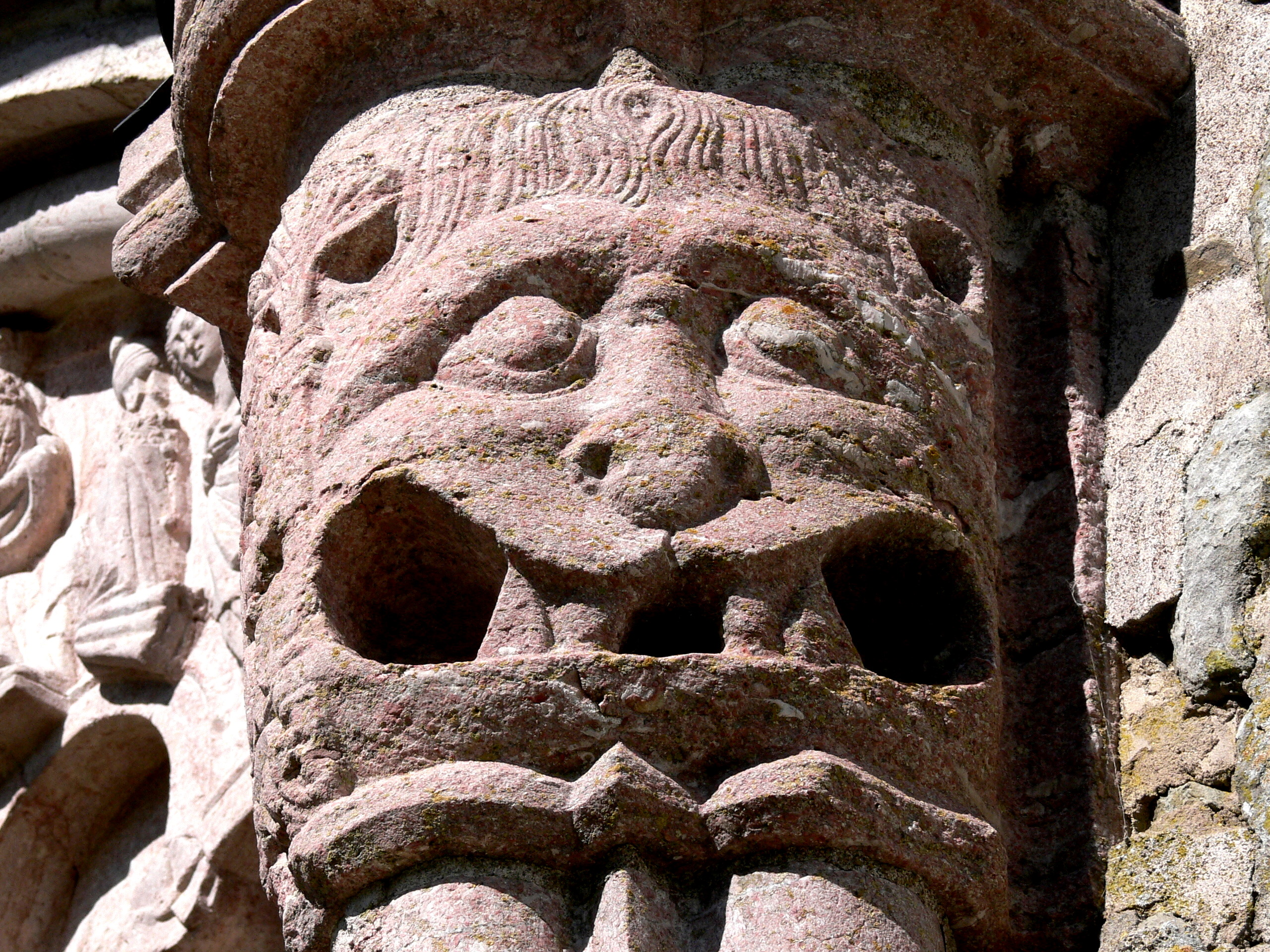 Grötlingbo Kyrka auf Gotland. Hauptportal ( 14.Jhdt. ): Dämonenfratze